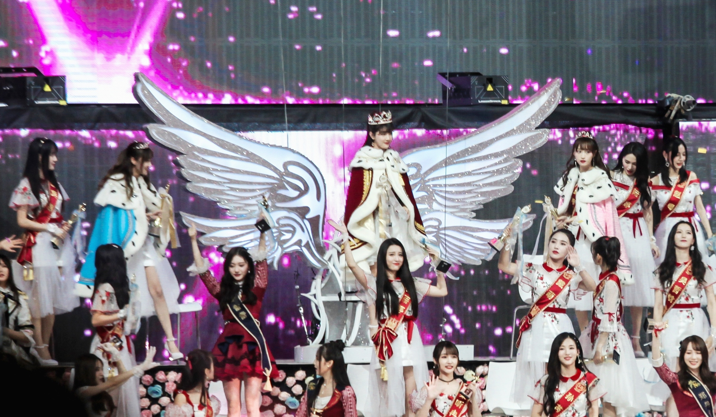 180728总选尾声卡黄实图Part2